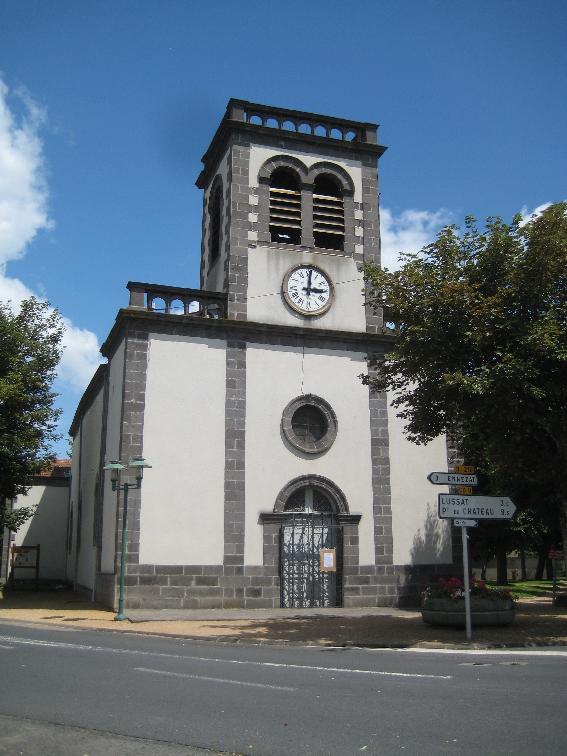 église de Chappes